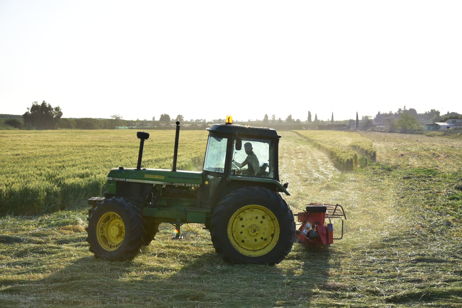 טרקטור בשעת קצירה